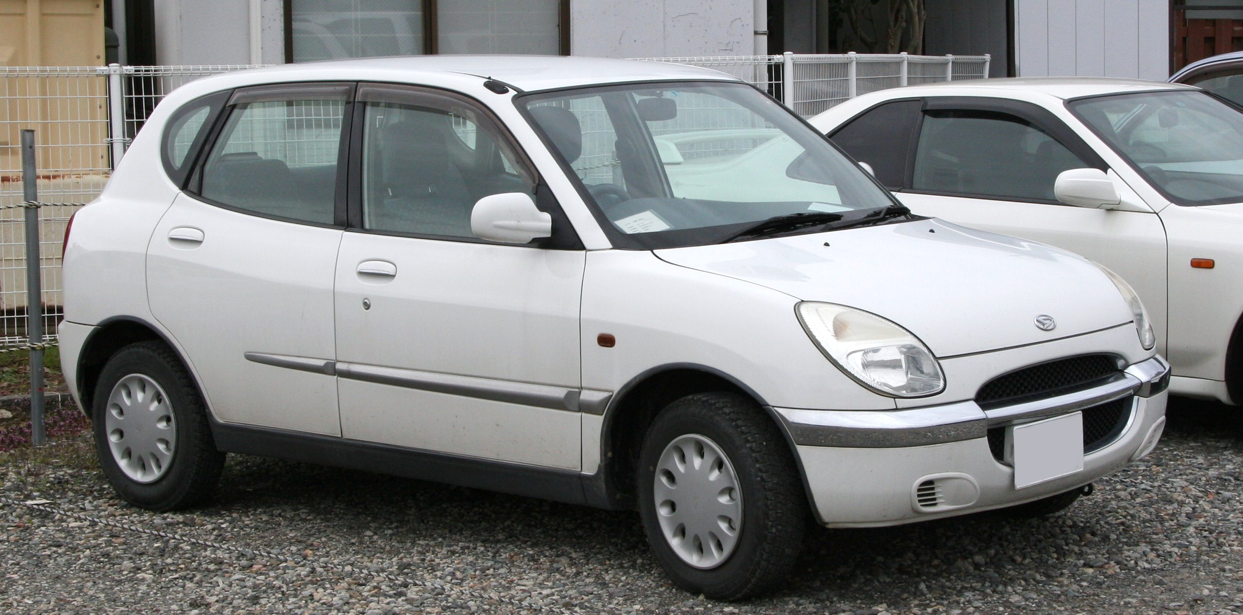 Daihatsu Storia